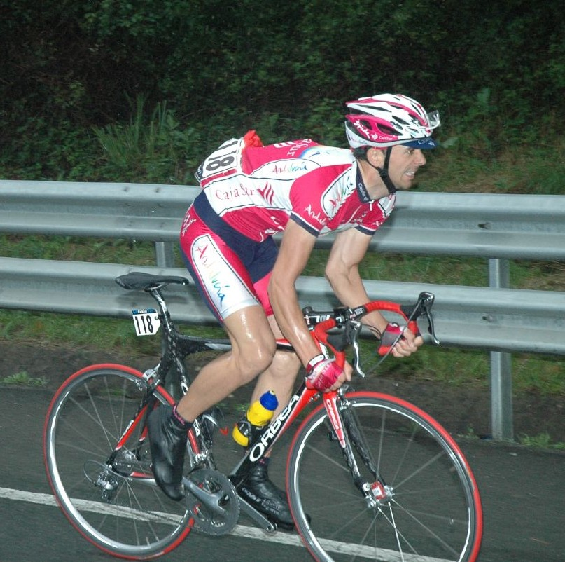 Jesus Rosendo (Euskal Bizikleta 2007)